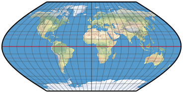 Eckert 5